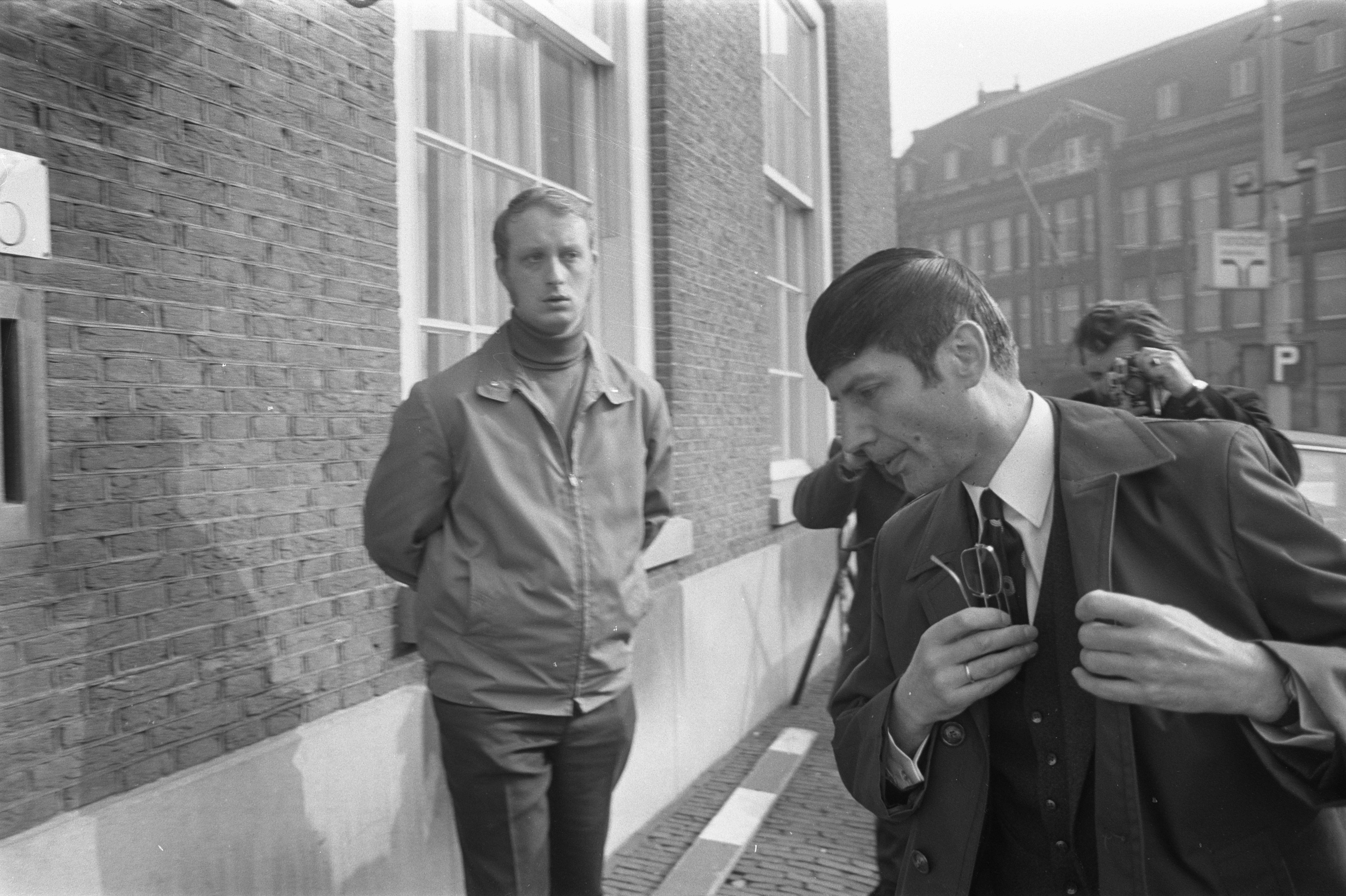 Collectie / Archief : Fotocollectie Anefo Reportage / Serie : [ onbekend ] Beschrijving : Demonstratie op het Binnenhof tegen de vrijlating van de Drie van Breda; minister van Justitie Van Agt arriveert zwaar bewaakt bij Tweede Kamer in Den Haag Datum : 29 februari 1972 Locatie : Den Haag, Zuid-Holland Trefwoorden : demonstraties, ministers, vrijlatingen Persoonsnaam : Agt, Dries van Fotograaf : Peters, Hans / Anefo Auteursrechthebbende : Nationaal Archief Materiaalsoort : Negatief (zwart/wit) Nummer archiefinventaris : bekijk toegang 2.24.01.05 Bestanddeelnummer : 925-4206